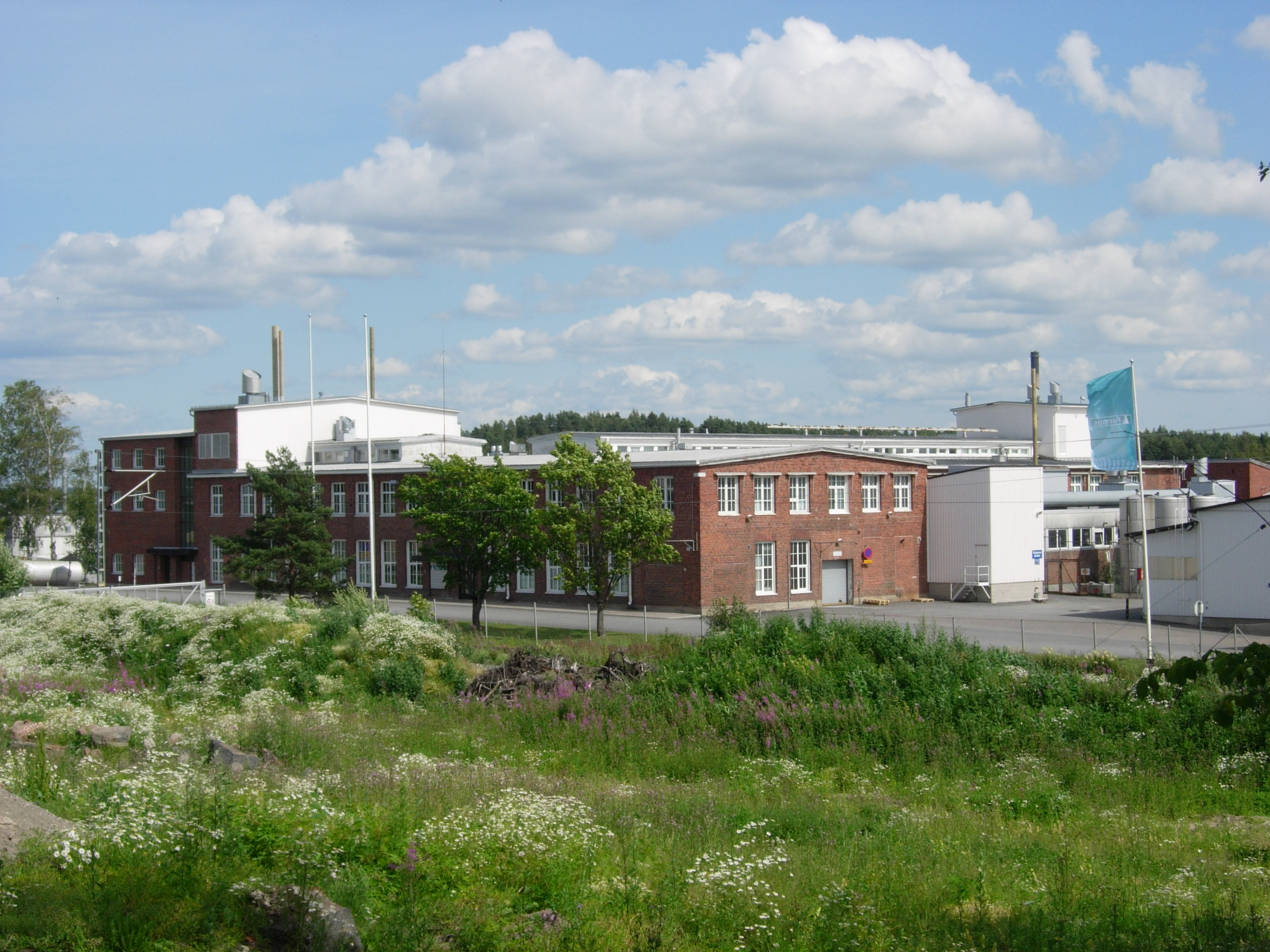 Farmoksen Turun tehtaat, Kärsämäki, Turku.